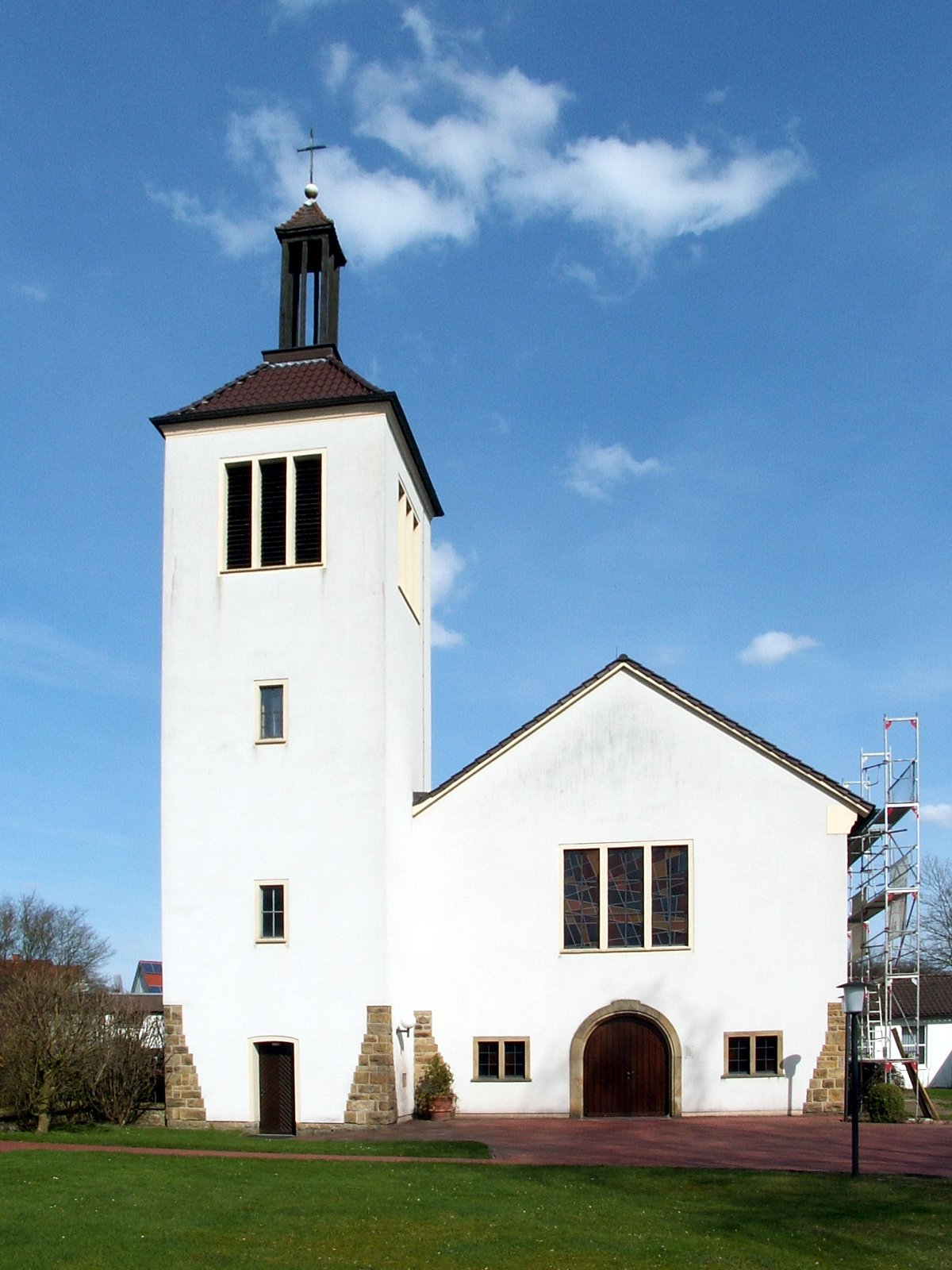 ev. Martinskirche in Osnabrück, Stadtteil Hellern, Ansicht von Westen